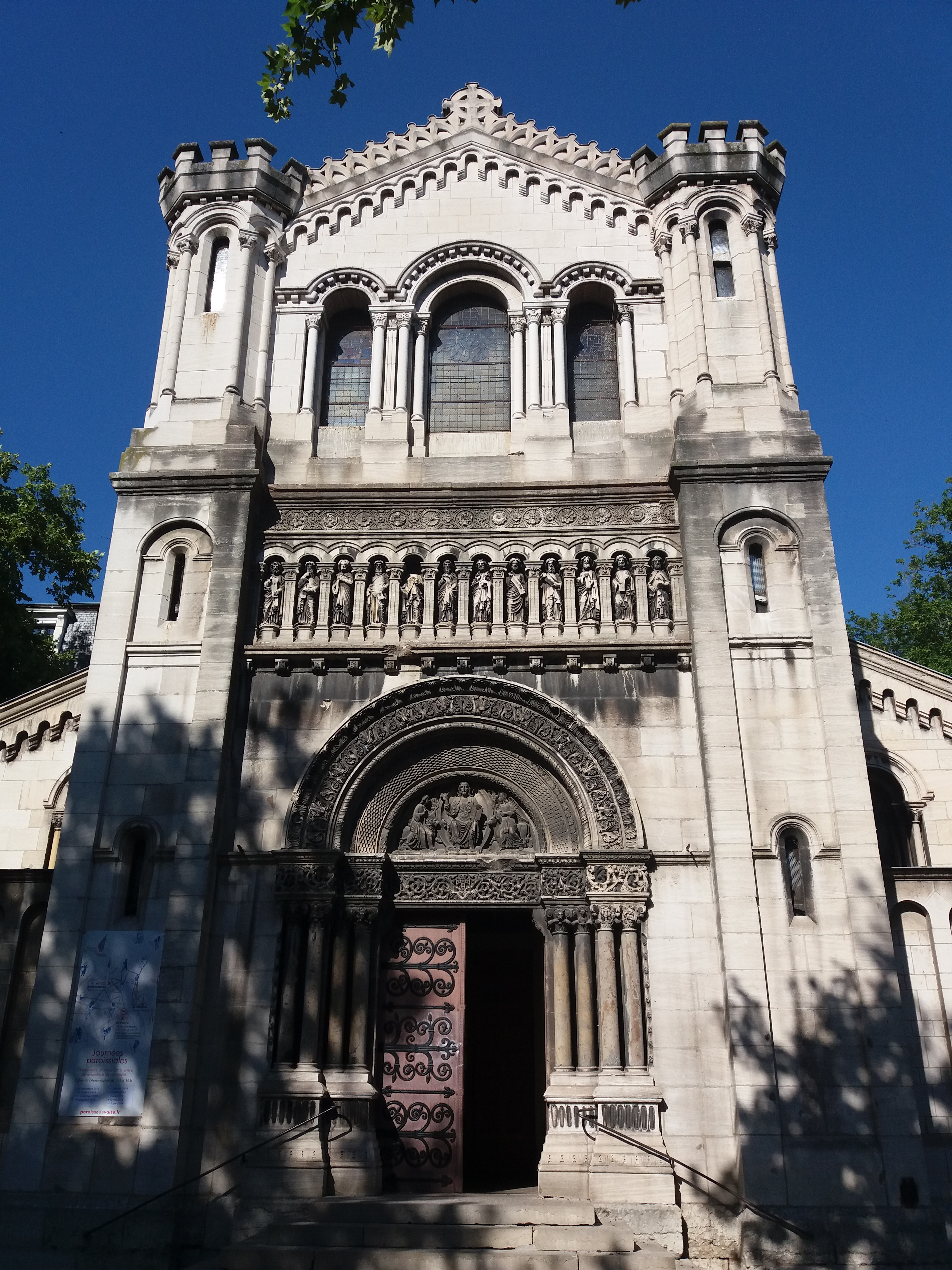 Façade.